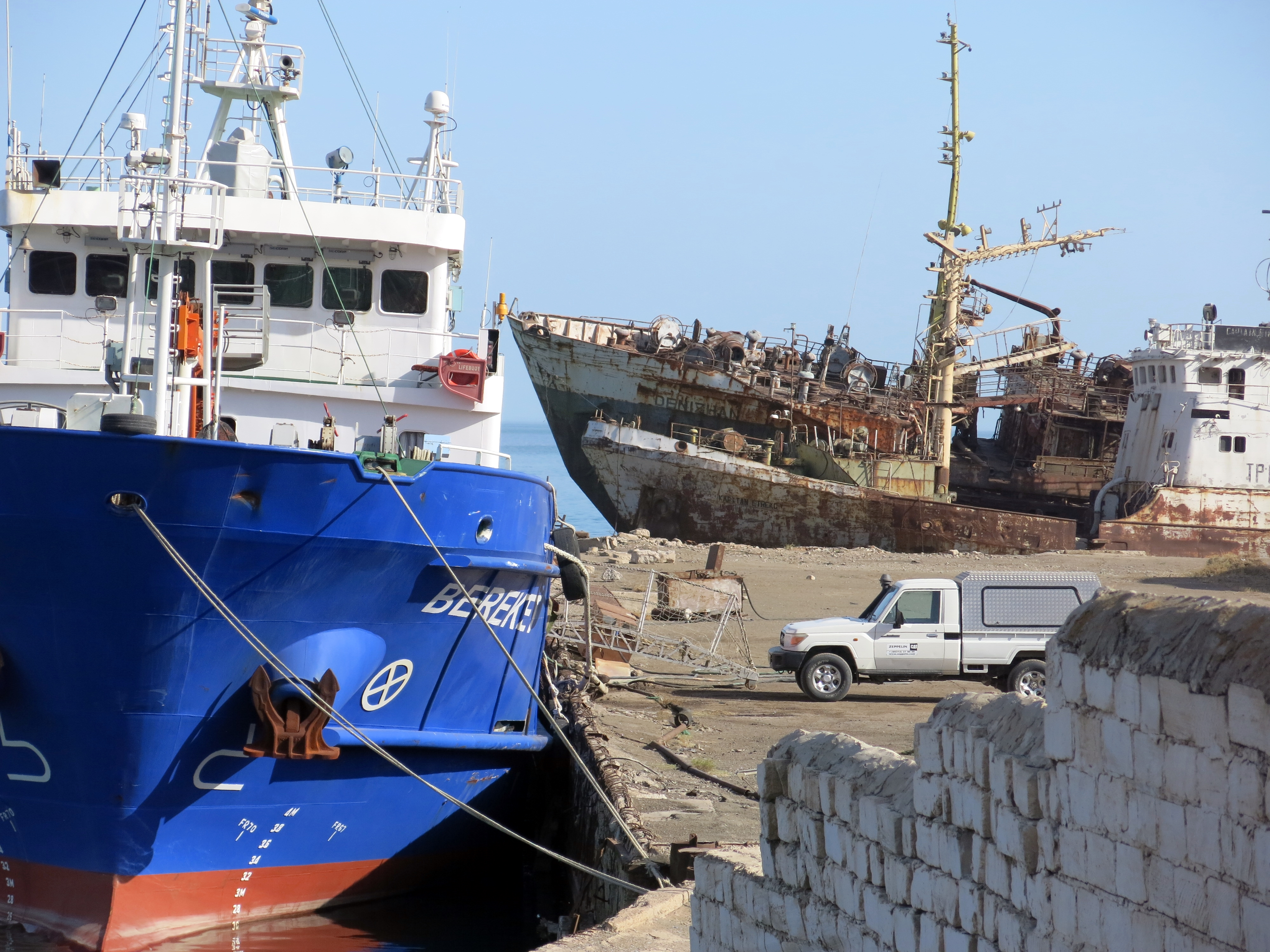 Blick durch den Absperrzaun in den abgesperrten Fischreihafen mit rostenden Schiffen der ehemaligen sowjetischen Hochseefischfangflotte